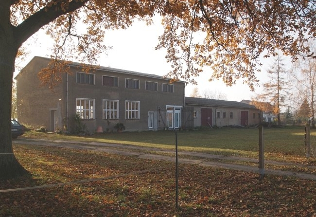 Das Atelier Pamitz in Klein-Bünzow, Ortsteil Pamitz